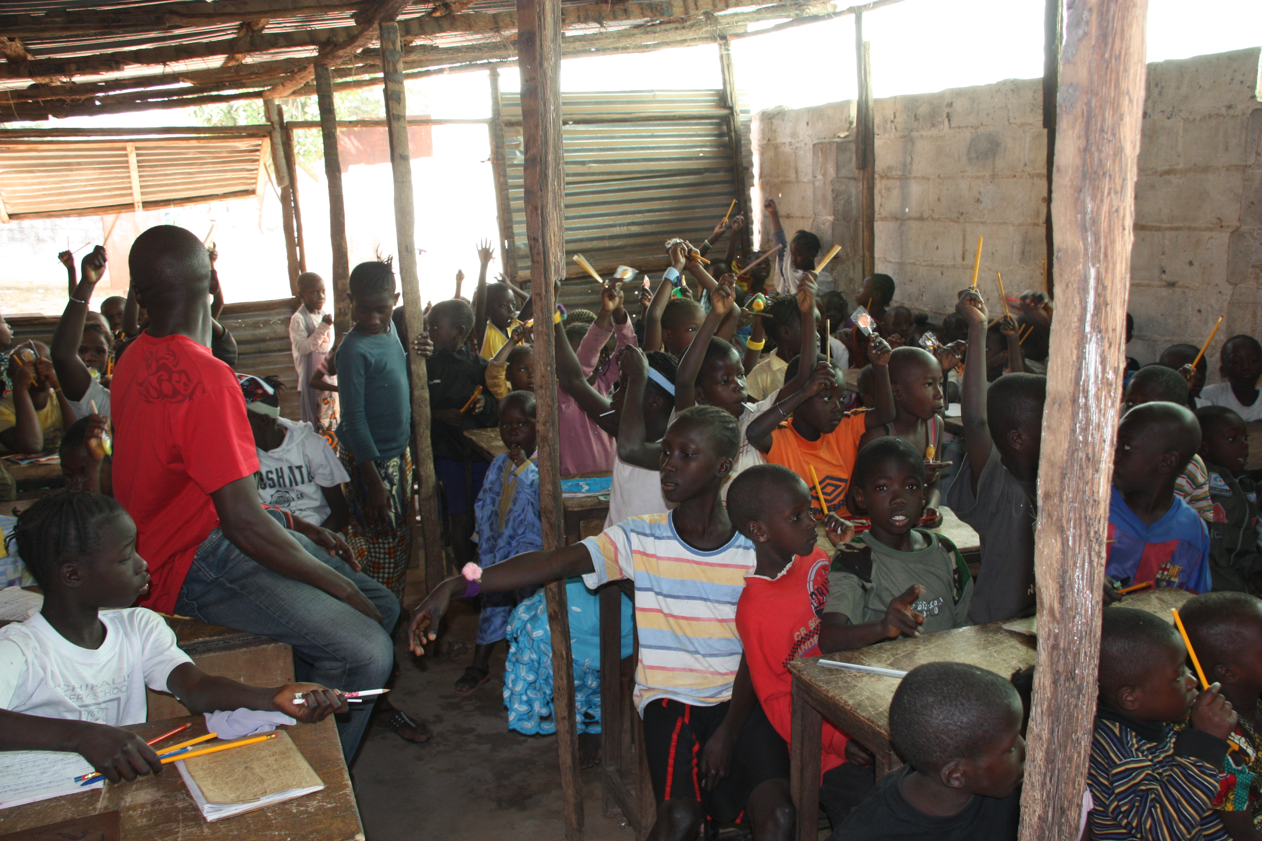 Klaslokaal in Gambia, Red Cross school